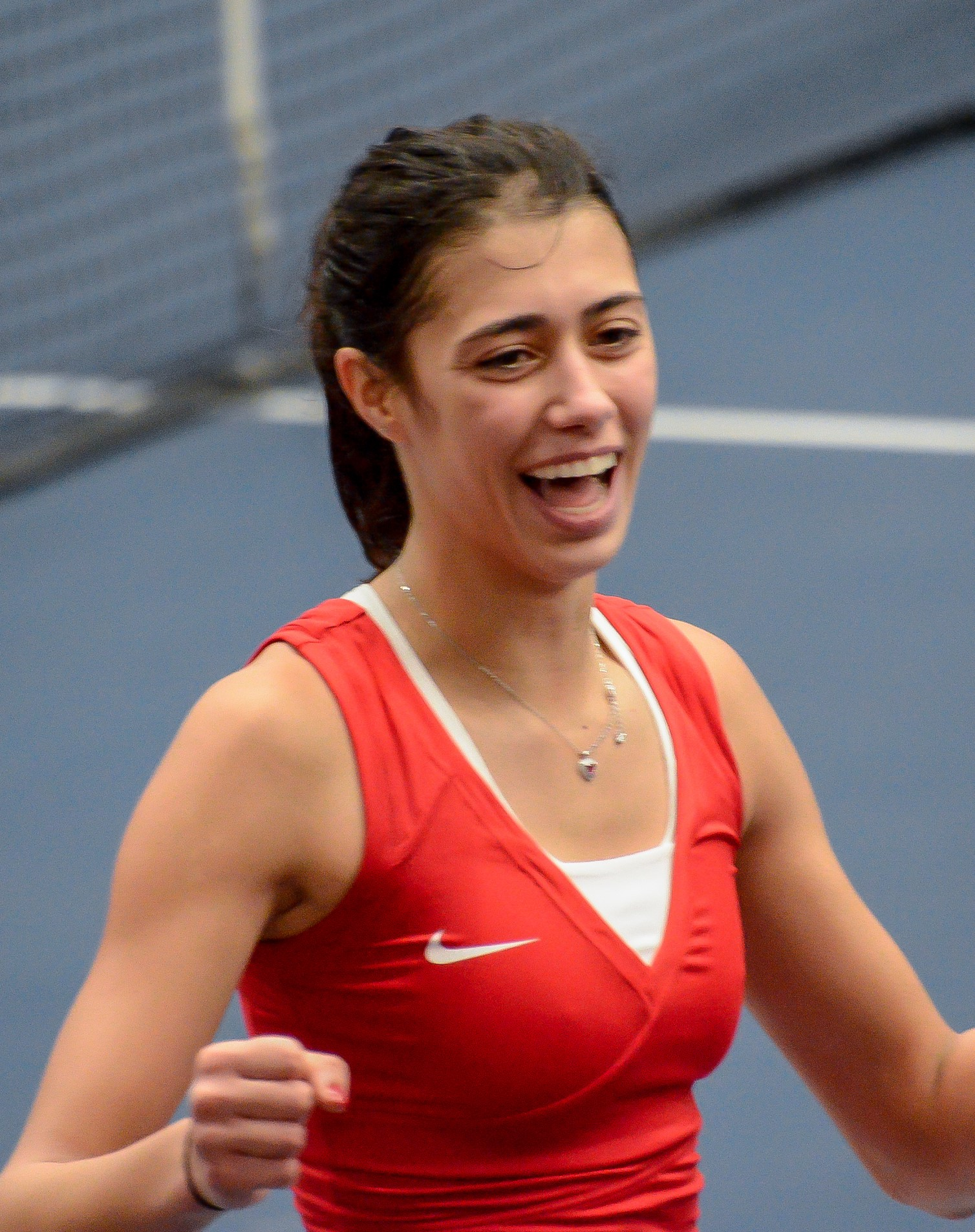 Olga Danilovic